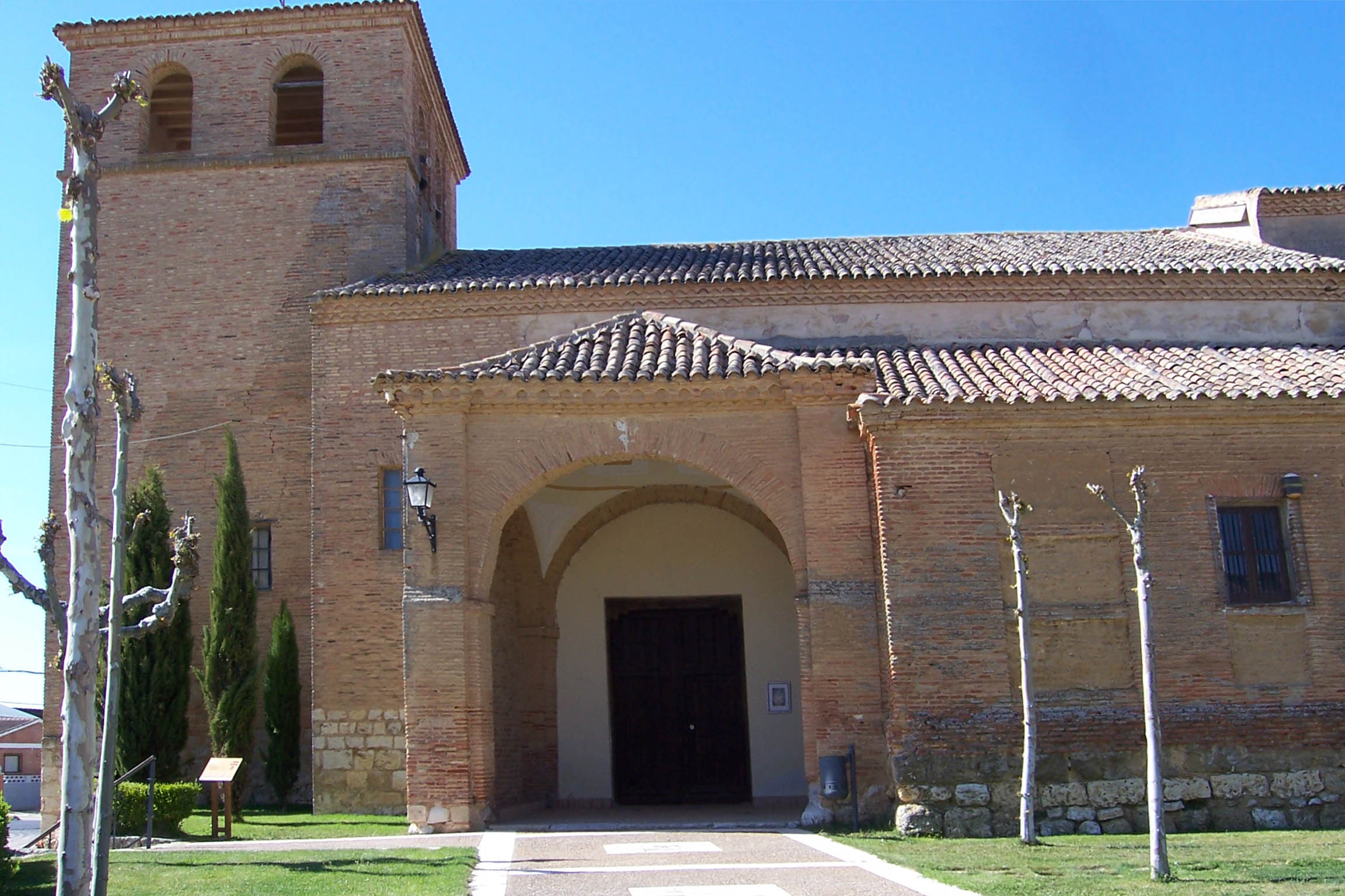 Iglesia de los Santos Justo y Pastor en la localidad de Cuenca de Campos (Valladolid, España). Es del siglo XVI, mudéjar y con una recia torre.